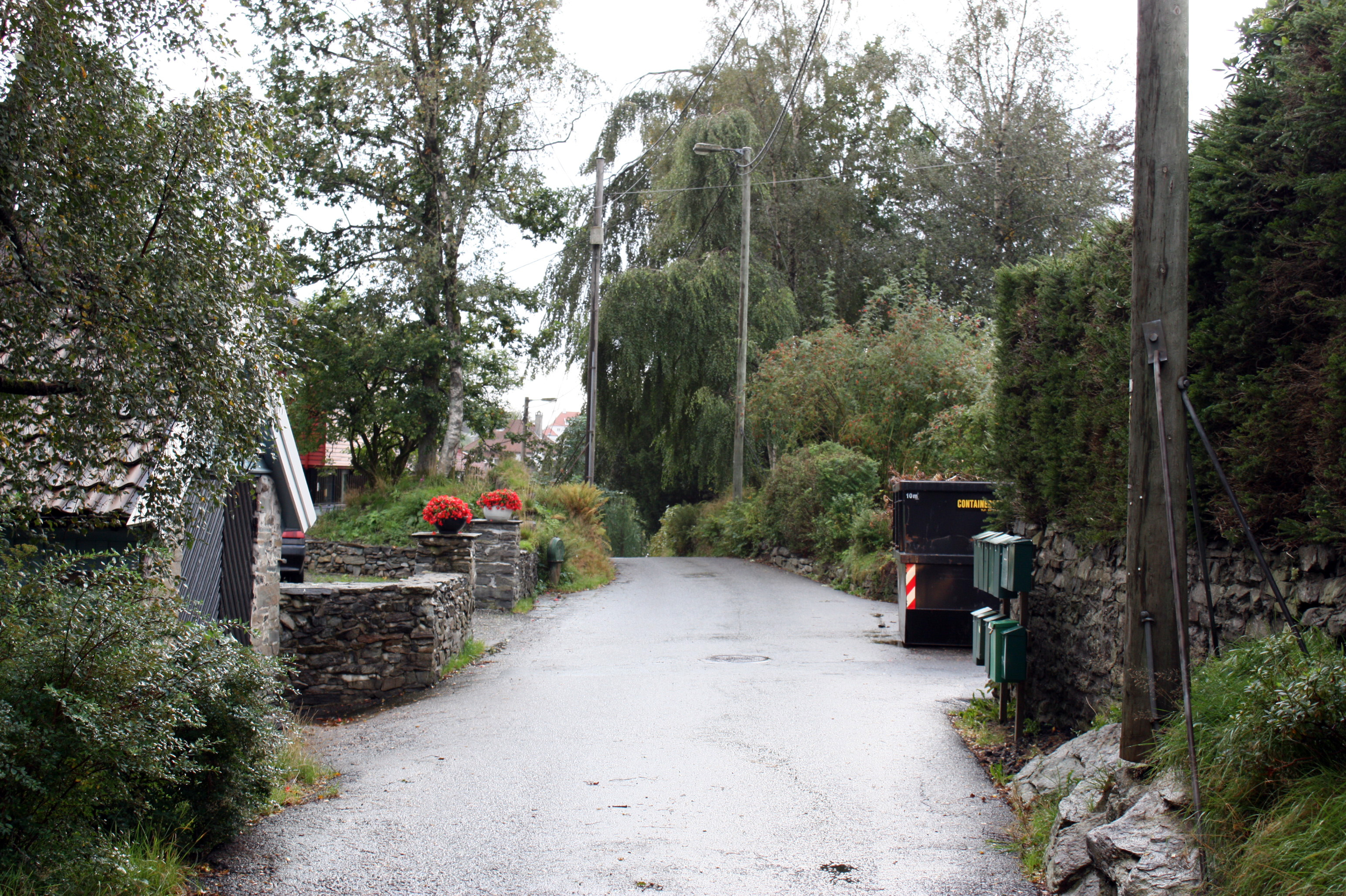 Nordahl Griegs veg, Fana, Bergen.